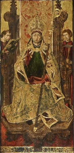 La obra representa al obispo San Blas sentado en un trono junto al que se hallan dos diáconos.